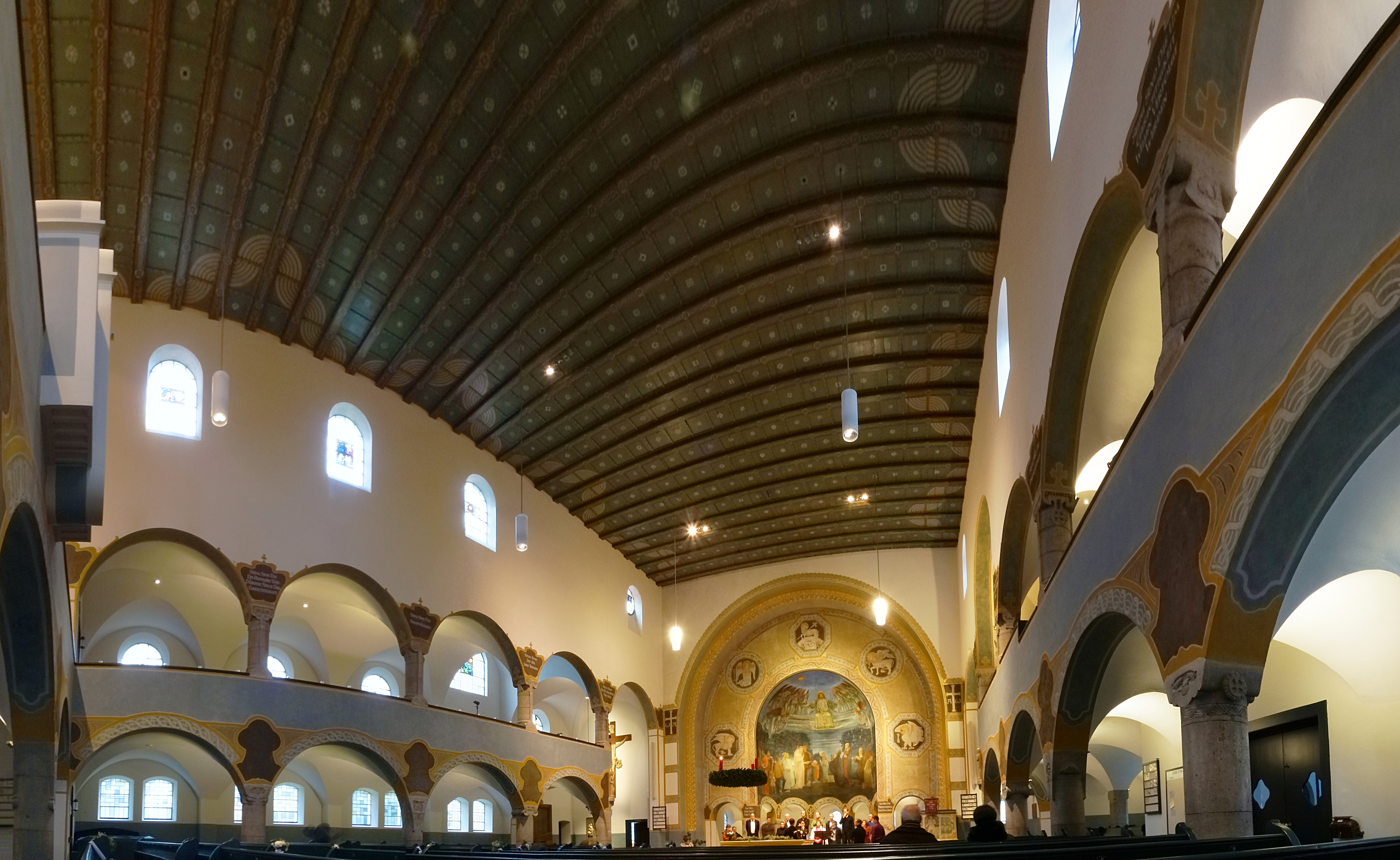 Innenraumpanorama Erlöserkirche (München)